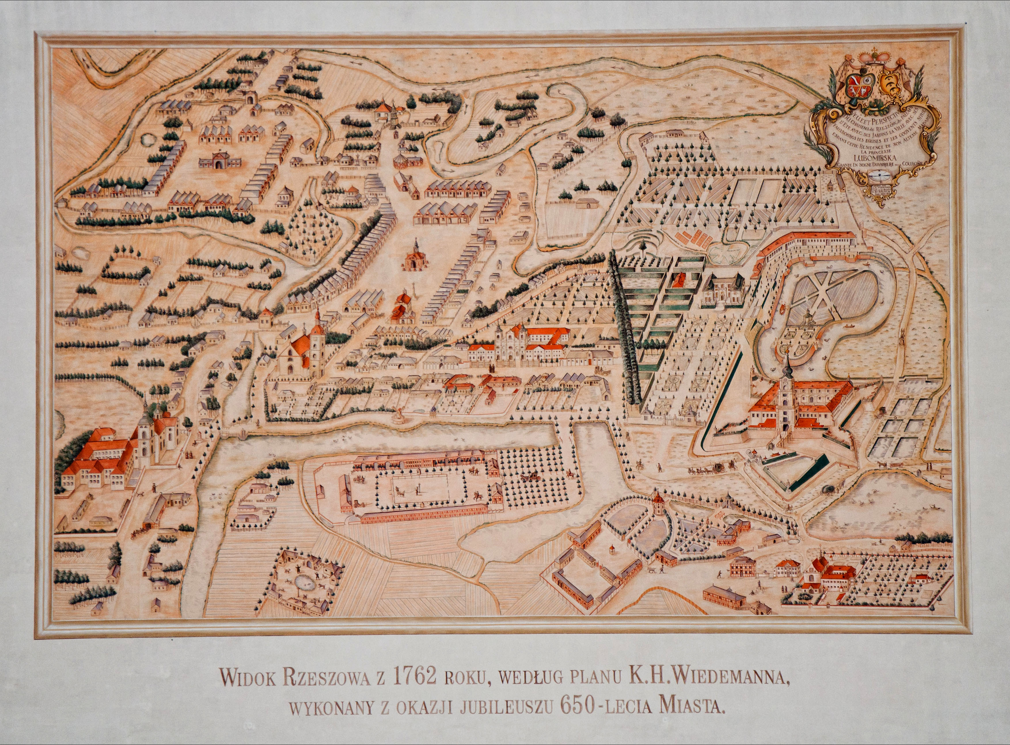 Rzeszów, kościół farny p.w. śś. Stanisława i Wojciecha, 1434, 1623, 1754